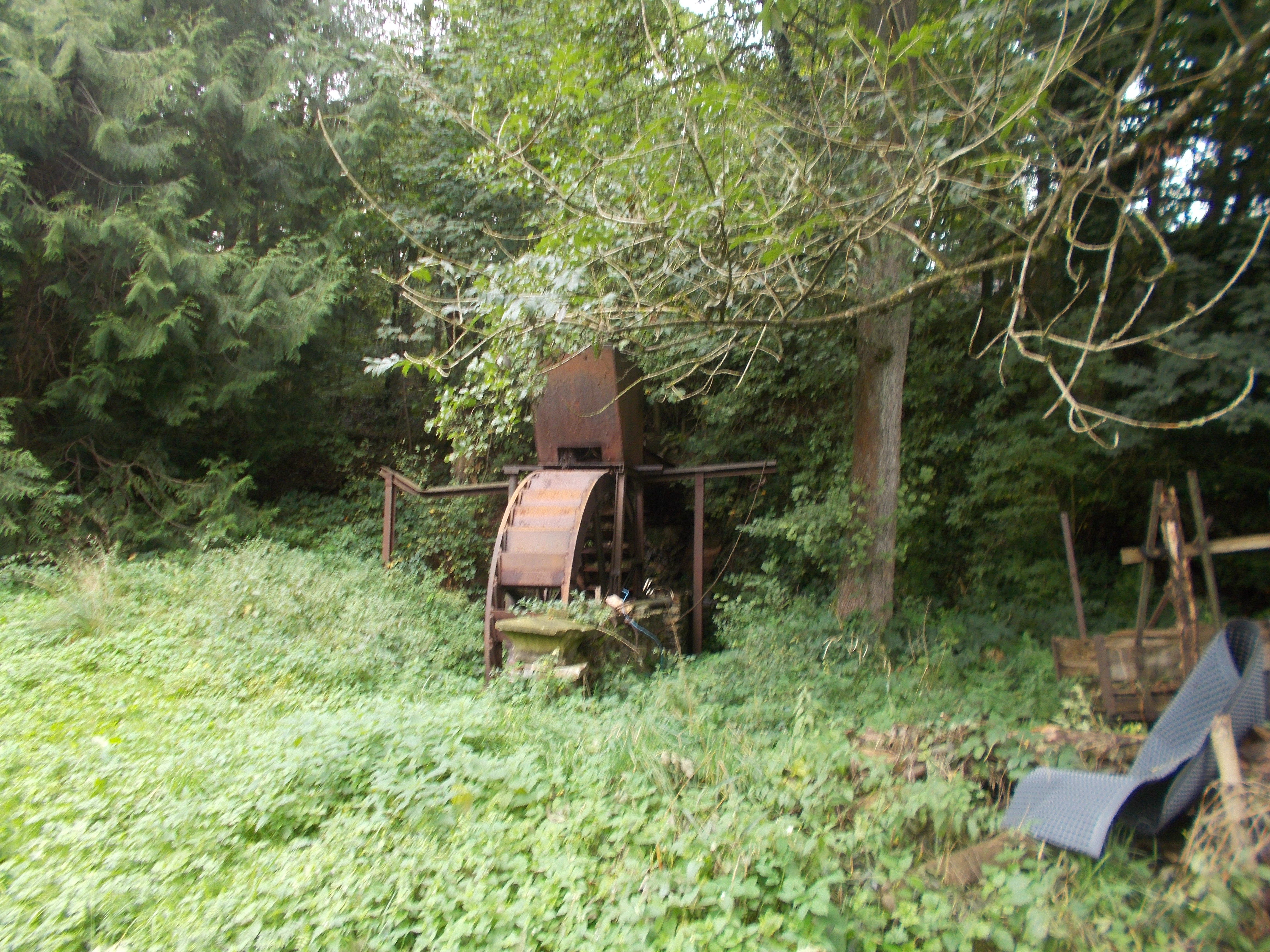 von Bruchsteinmauer umgebenes Gelände und Baulichkeiten der früheren Erzhütte Nr. 1: ehemaliges Kleinwarenlager (1771) Nr. 3: Herrenhaus; Mansarddachbau, Seitenrisalite (drittes Drittel des 18. Jahrhunderts) Nr. 3a: Verwaltungs- und Gästehaus; Stall- und Remisengebäude (ab 1772) Nr. 5: Wohn- und Produktionsbau Reste des eisernen oberschlächtigen Wasserrads (zweite Hälfte des 19. Jahrhunderts) gusseiserne Brücke (um 1800) Reste des Hochofens (Anfang des 19. Jahrhunderts) Lauf des Traunbachs, Weiher, Landschaftsgarten